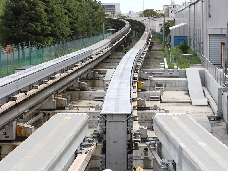 Aiguille du monorail de Tokyo en mouvement à l'entrée de la station Showajima